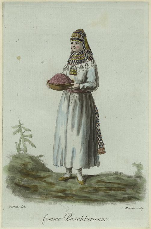 Башкирка